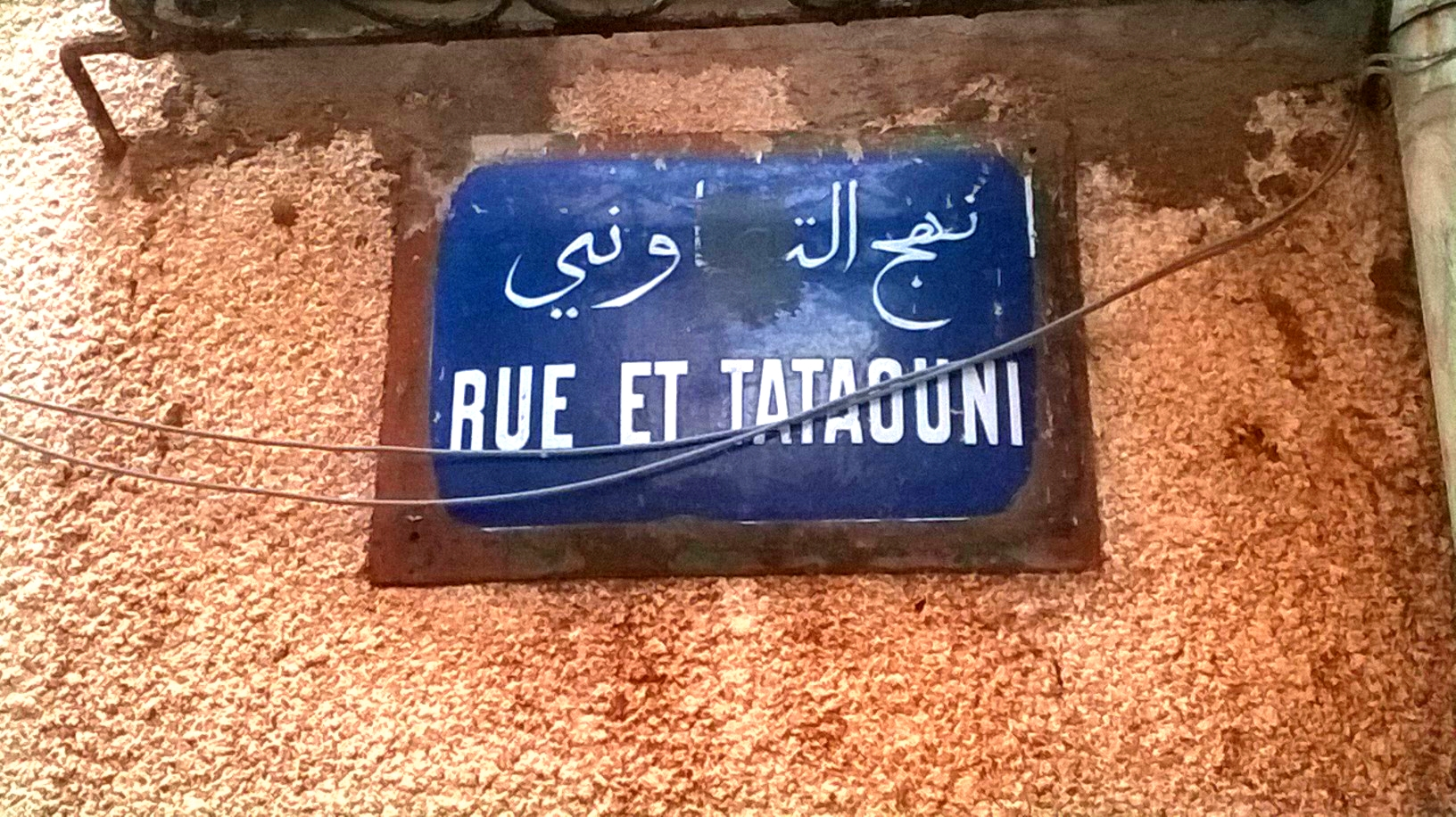 Bab Jedid, médina de Tunis, Tunisie باب الجديد، مدينة تونس العتيقة ، تونس